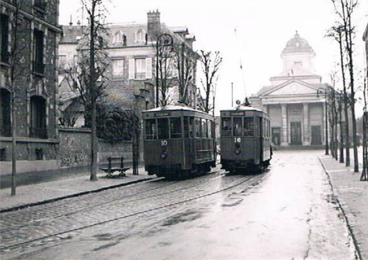 Carte postale avec en photo les tramway circulant boulevard de Lesseps à Versailles.